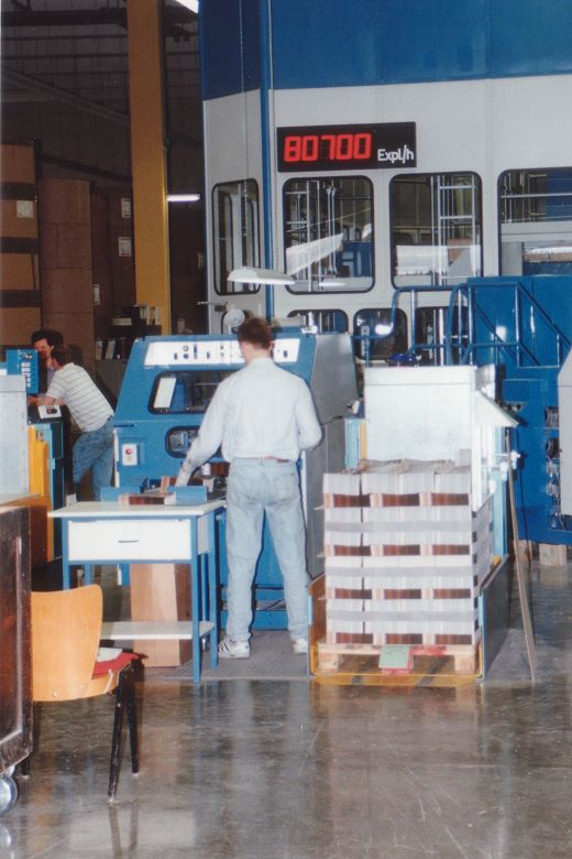 Rollenoffset-Druckmaschine der Zeugen Jehovas in ihrer Deutschlandzentrale in Niederselters. Eigene Aufnahme bei einer Führung im Jahr 1995 durch das 'Bethel' der Zeugen Jehovas.